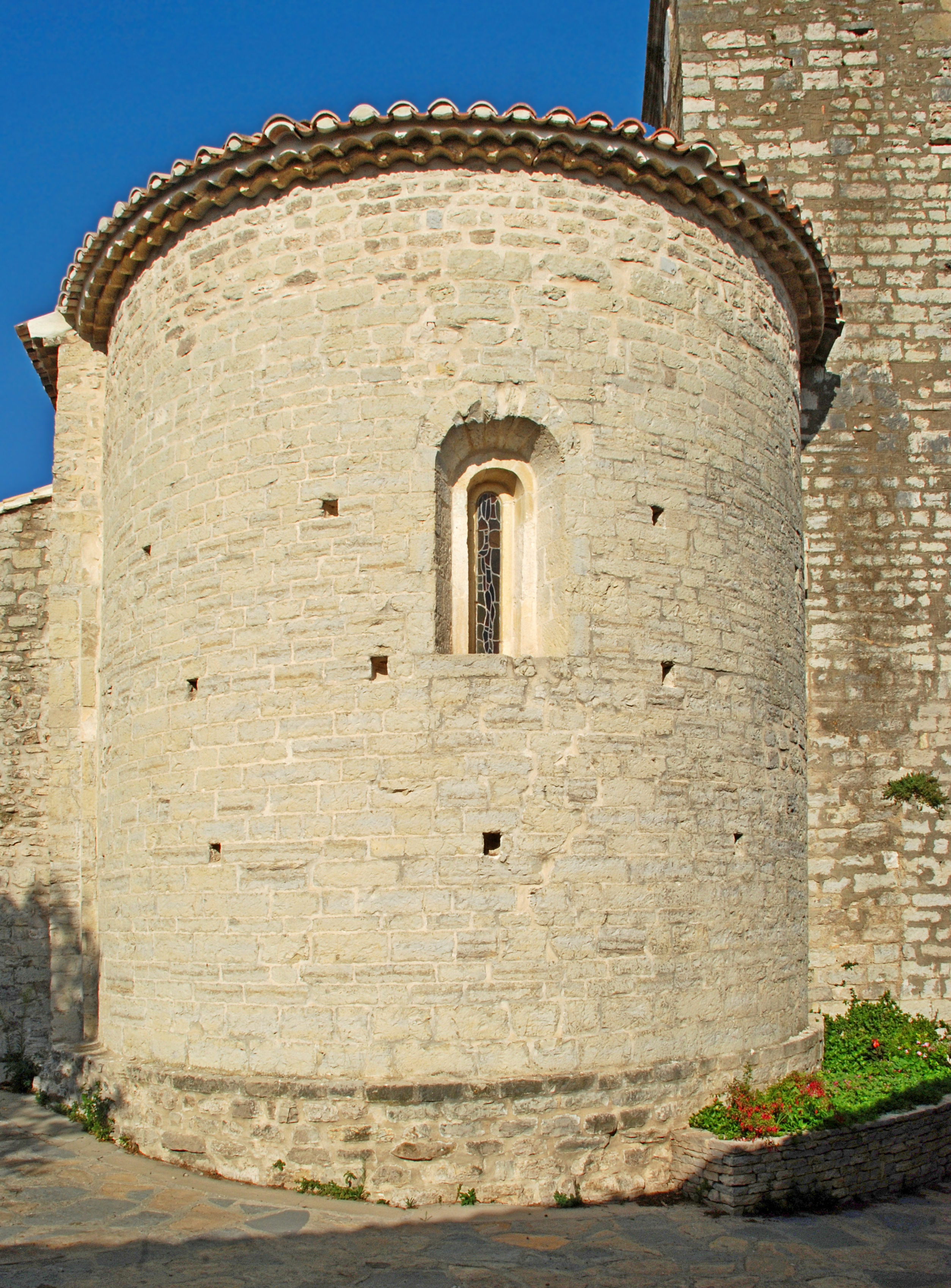 France - Hérault - Église Saint-Barthélémy de Garrigues